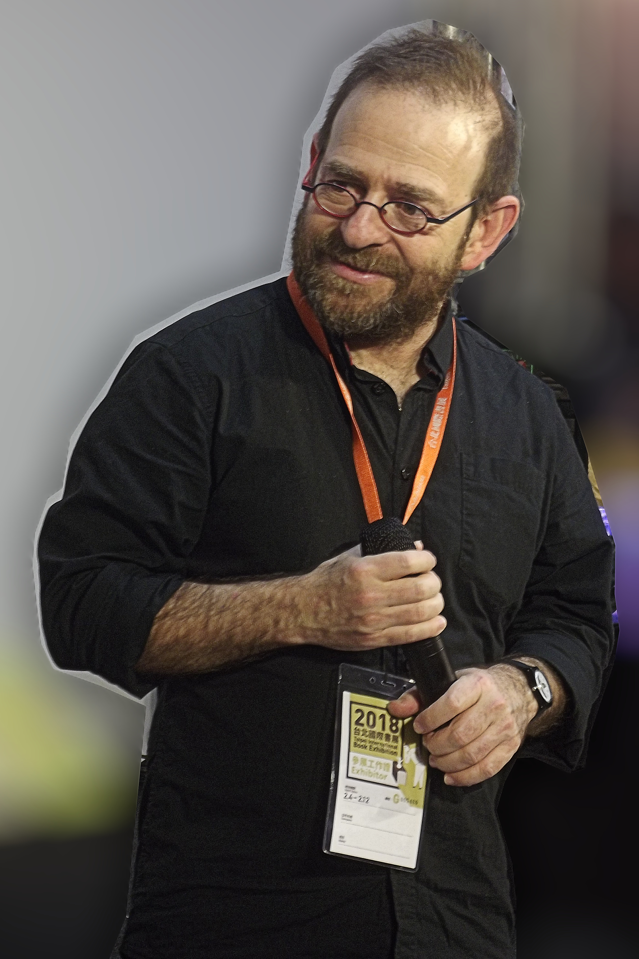 Hanoch Piven, Israeli mixed media artist.